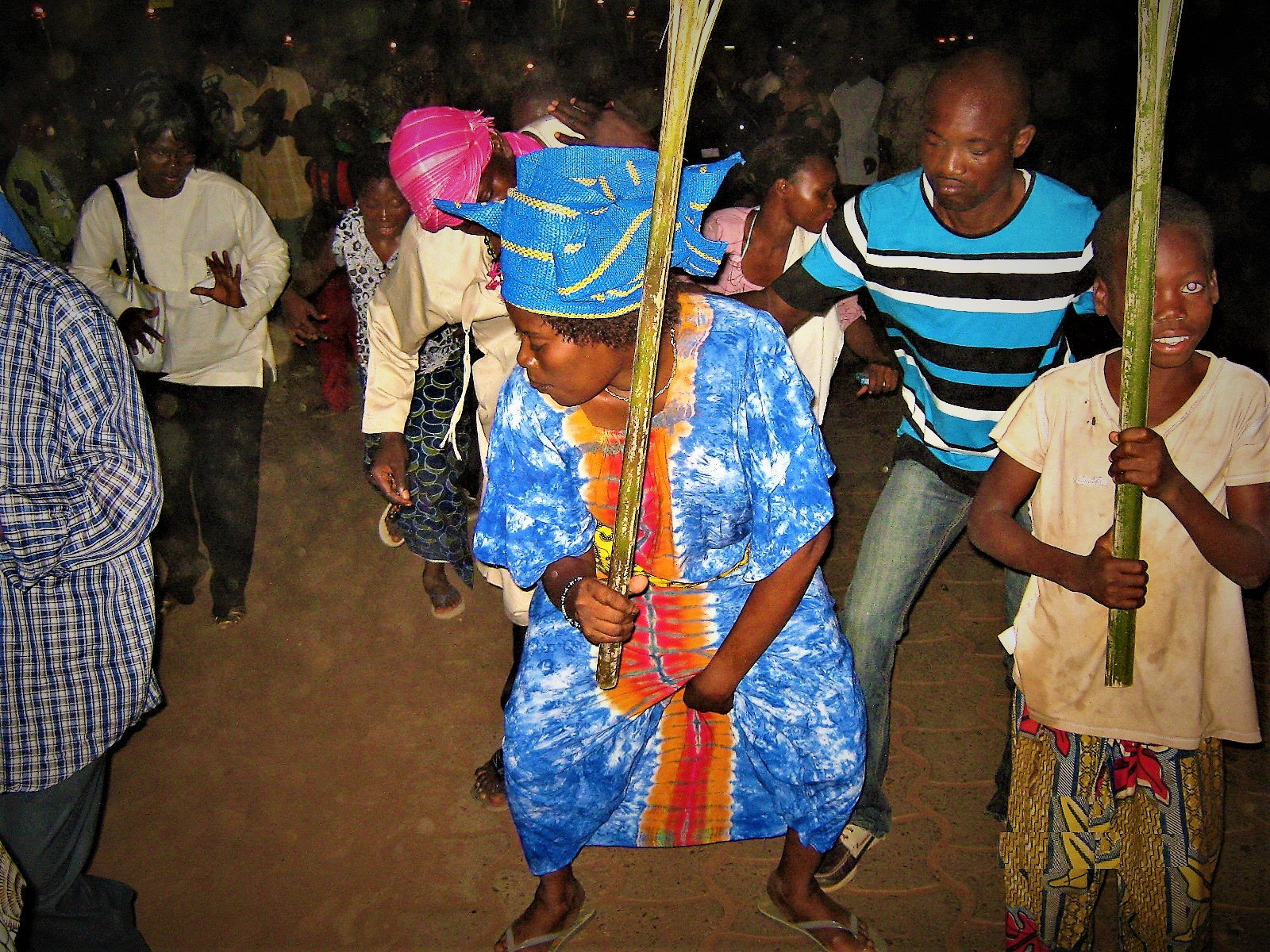 Marche aux flambeaux à la veille de la tenue d’un forum des jeunes à Dangbo au Bénin organisé par la population de la localité . Elle est organisée en 2009